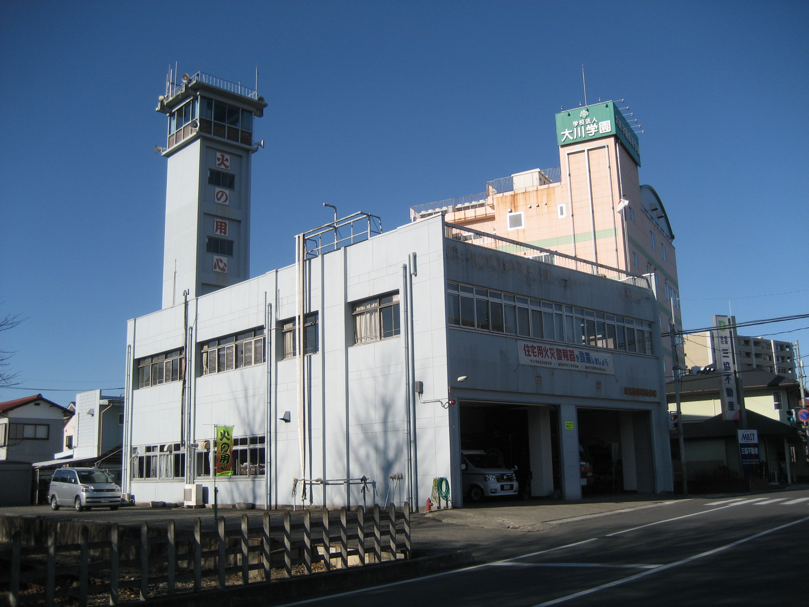 埼玉西部消防本部稲荷分署庁舎